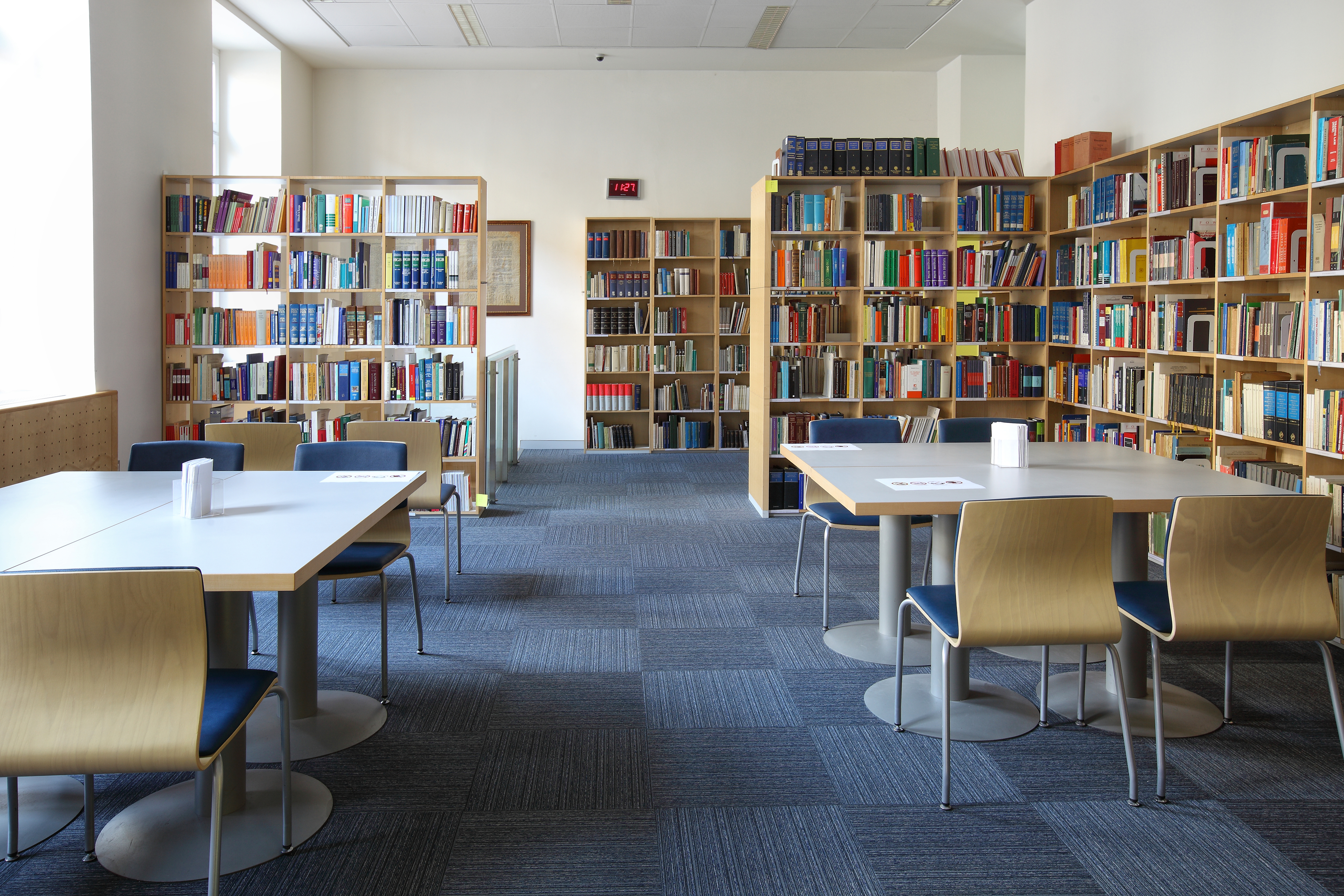 Knjižnica Mirka Ilešiča Pravne fakultete Univerze v Mariboru